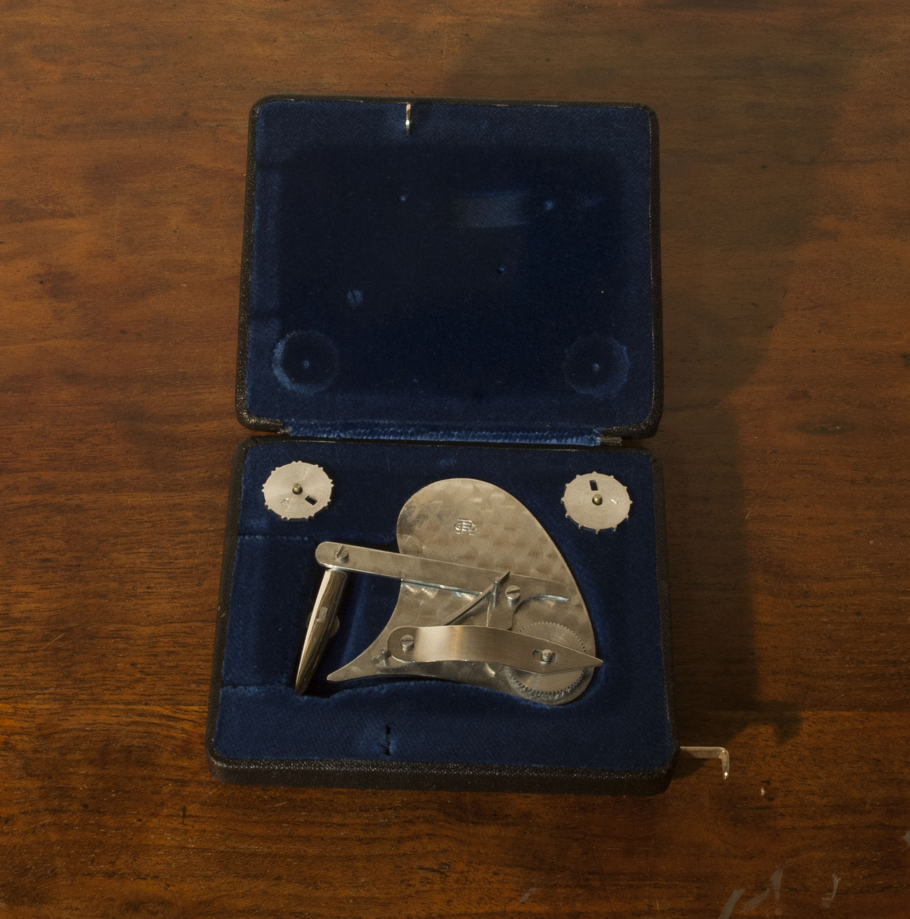 Et streg-linjeapparat i sit etui.